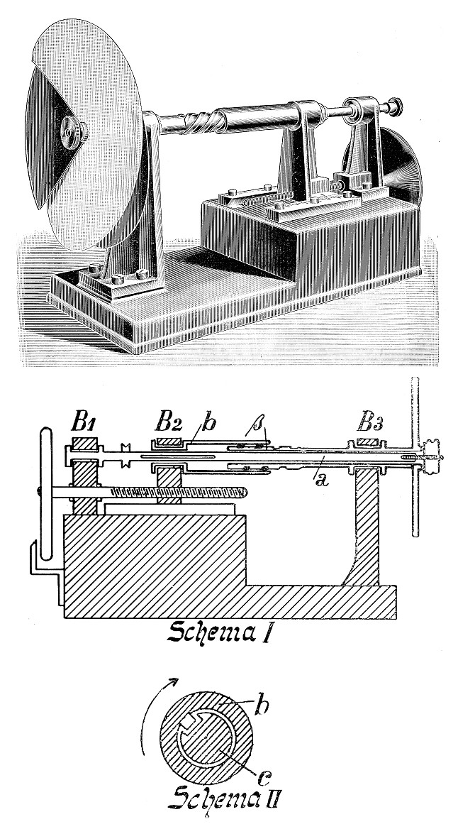 Variationskreisel nach Musil. Dieser Kreisel dient demselben Zweck wie der bekannte Kreisel nach Marbe